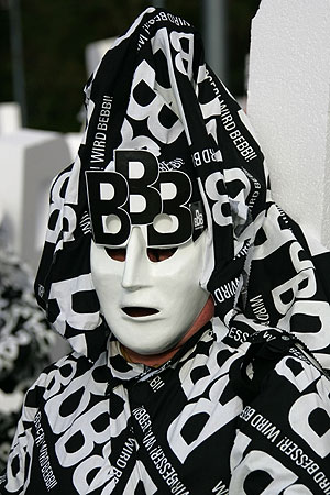 Basler Fasnacht 05